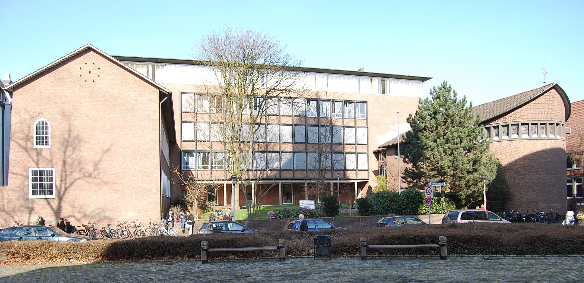 Gebäude der Hildegardisschule Münster